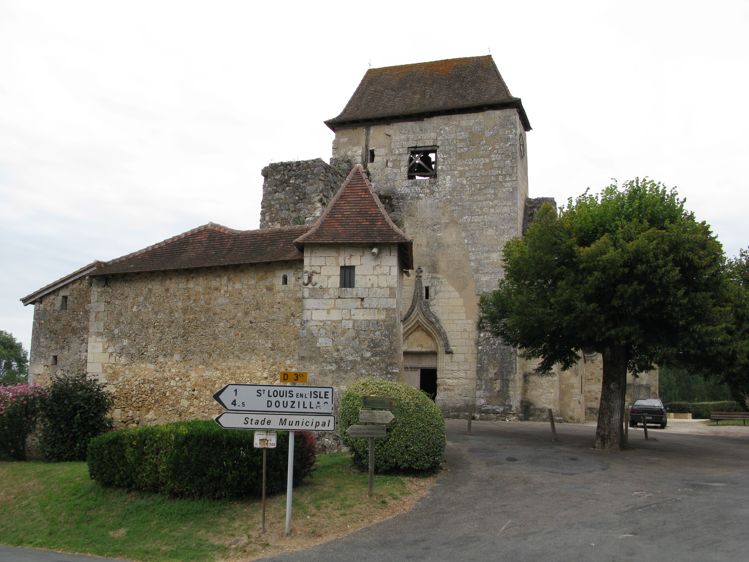 Église de Sourzac